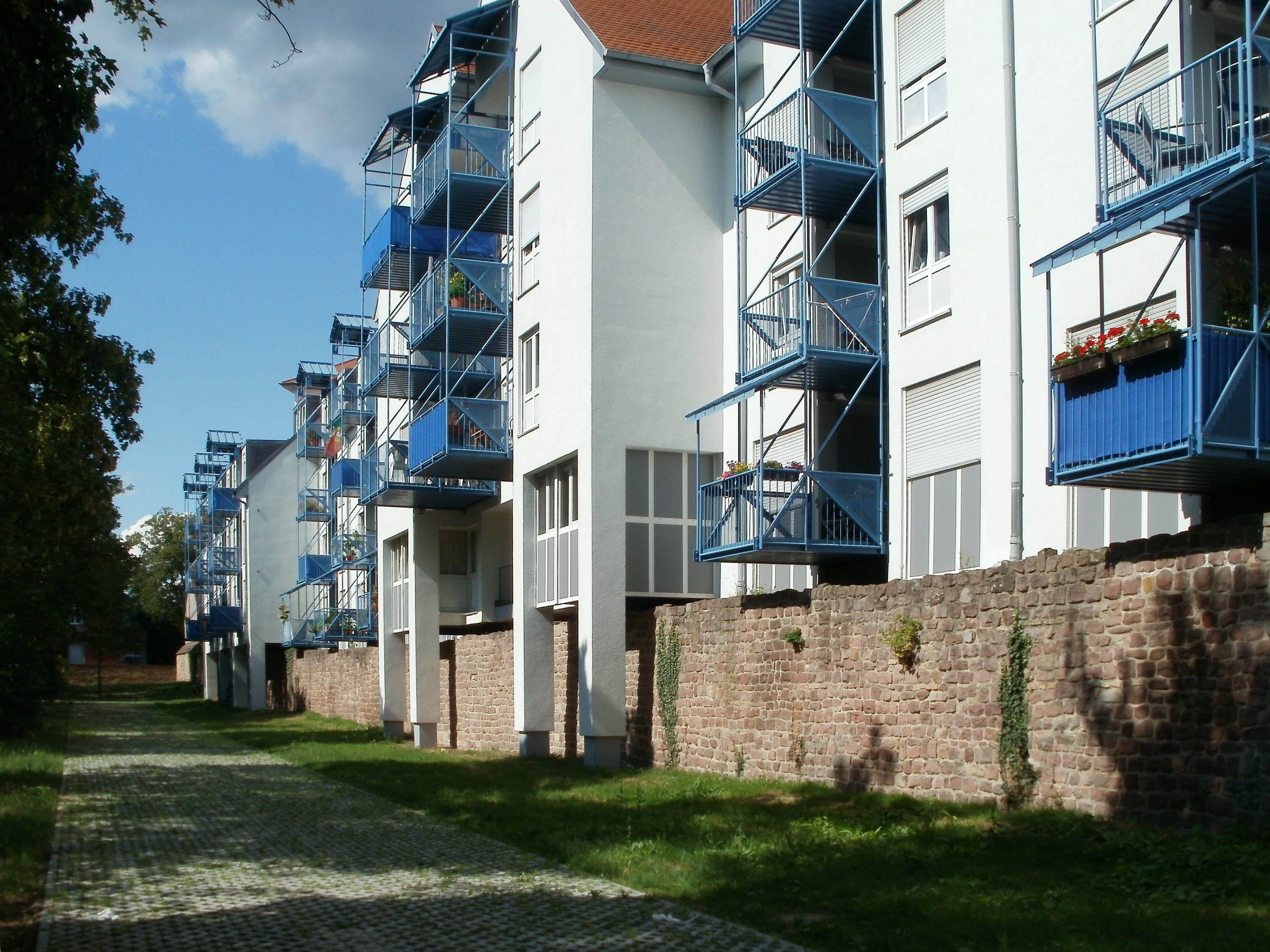 Stadtmauerrest am Postgraben in Speyer